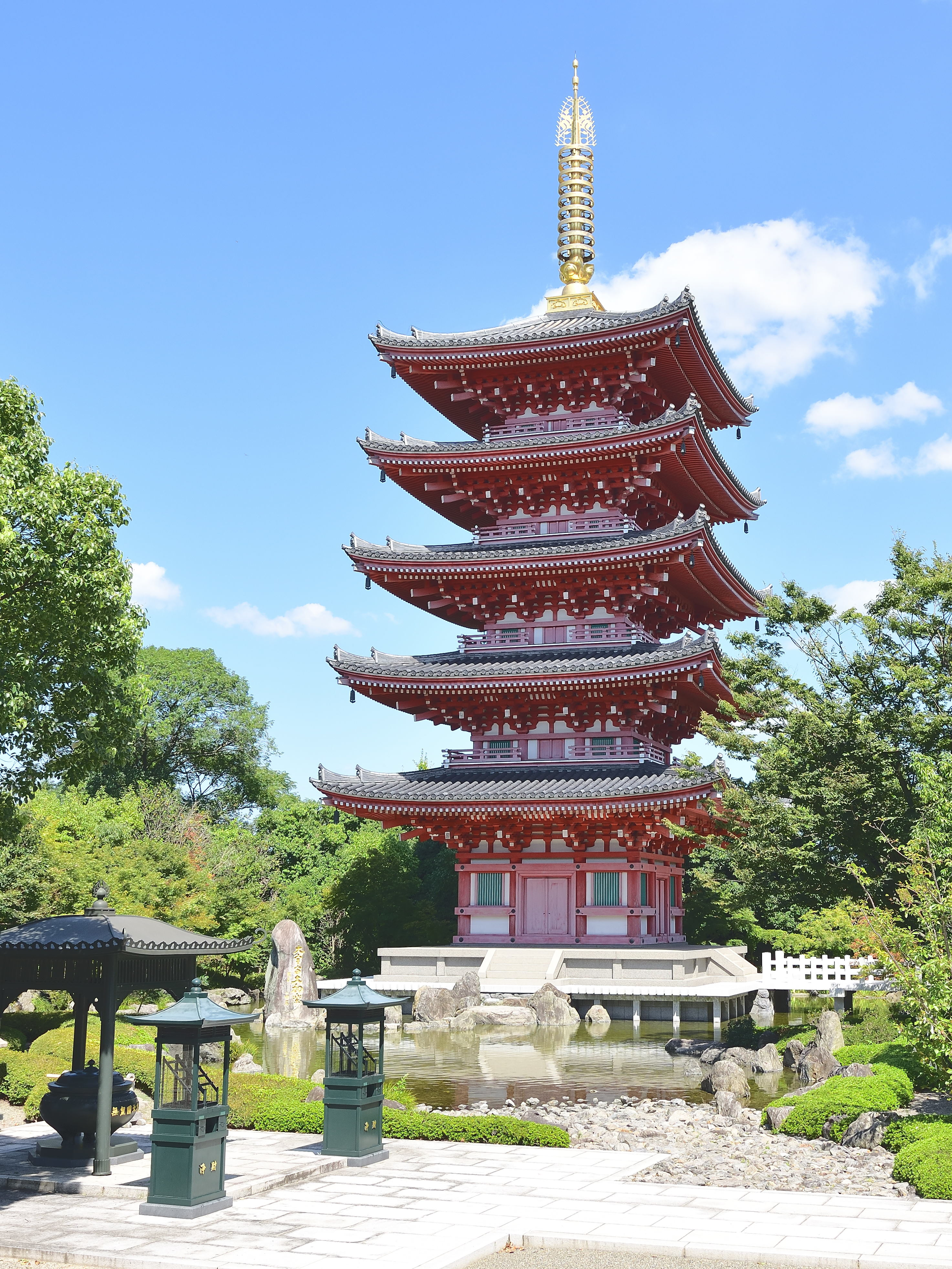 平成9年（1997年）4月12日落慶